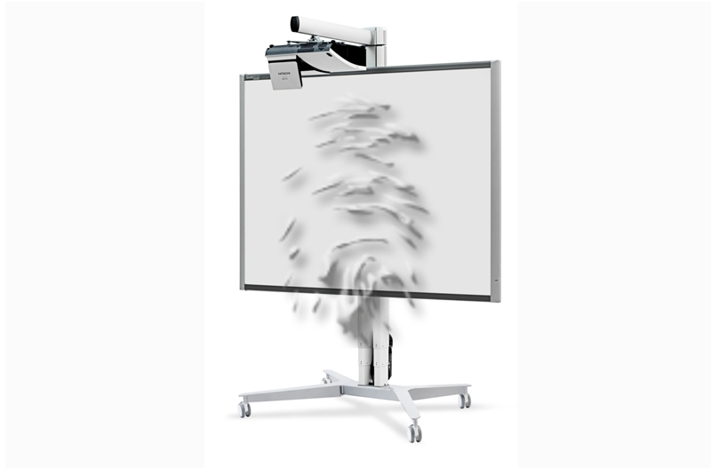 Pied motorisé soutenant un TBI avec le vidéoprojecteur